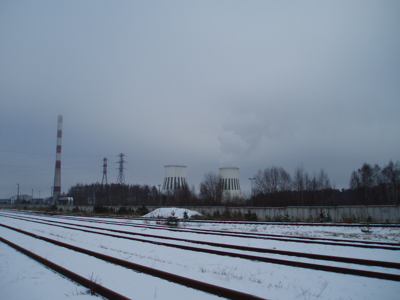 Rīgas TEC-2 Aconē. Skats no Rīgas - Ērgļu dzelzceļa līnijas.